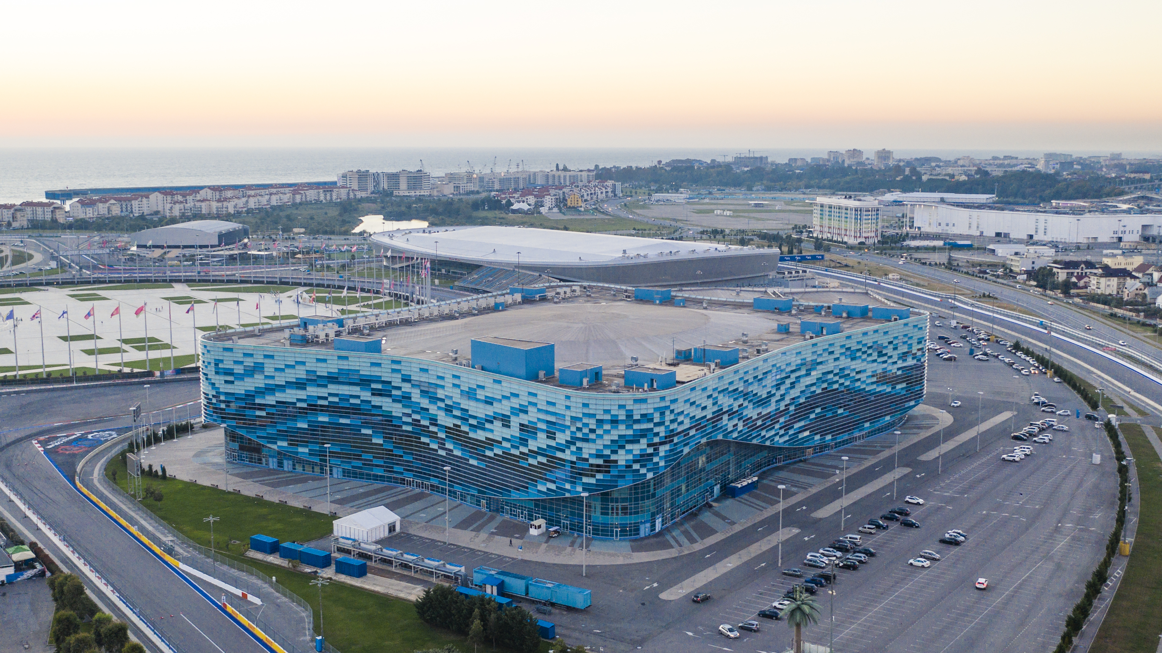 Blick auf den Olympiapark Adler (Sotschi)